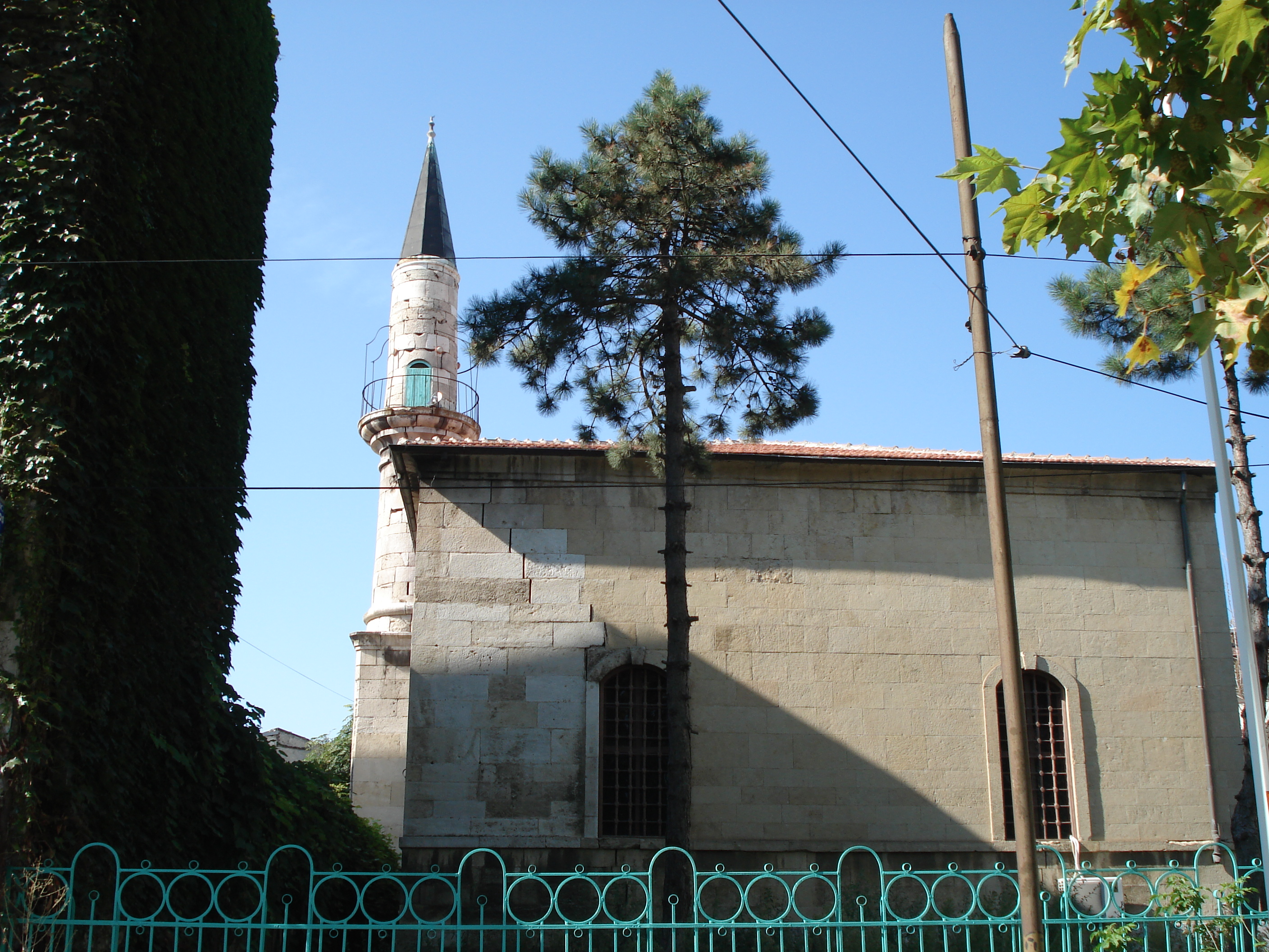 Hunchiar Mosque in Constanţa, Romania. Built in 1867-1868 by Ottoman Sultan Abd-ul-Aziz.